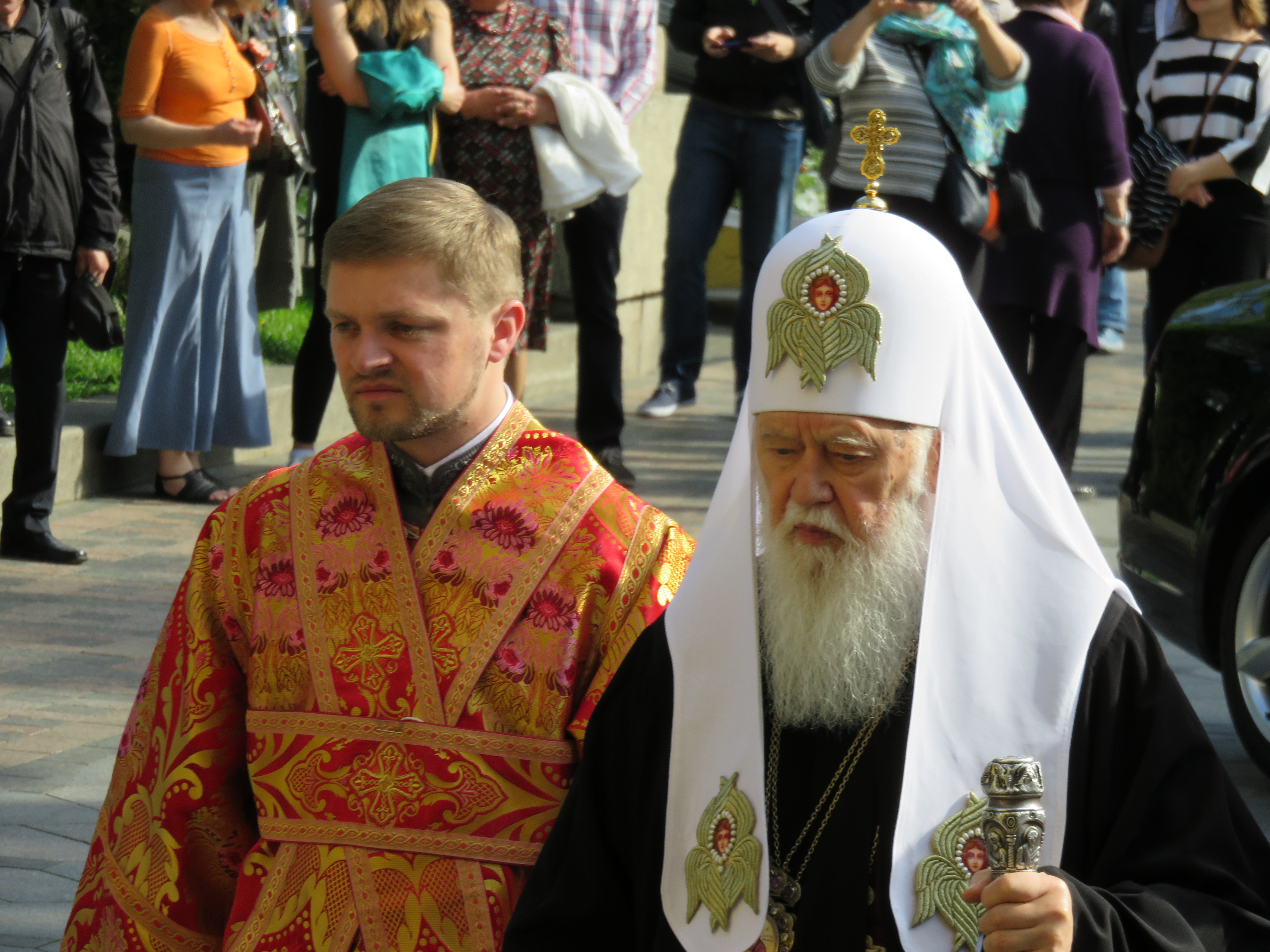 Патріарх Філарет біля Собору св. Володимира у Києві на Великдень, 1 травня 2016 року